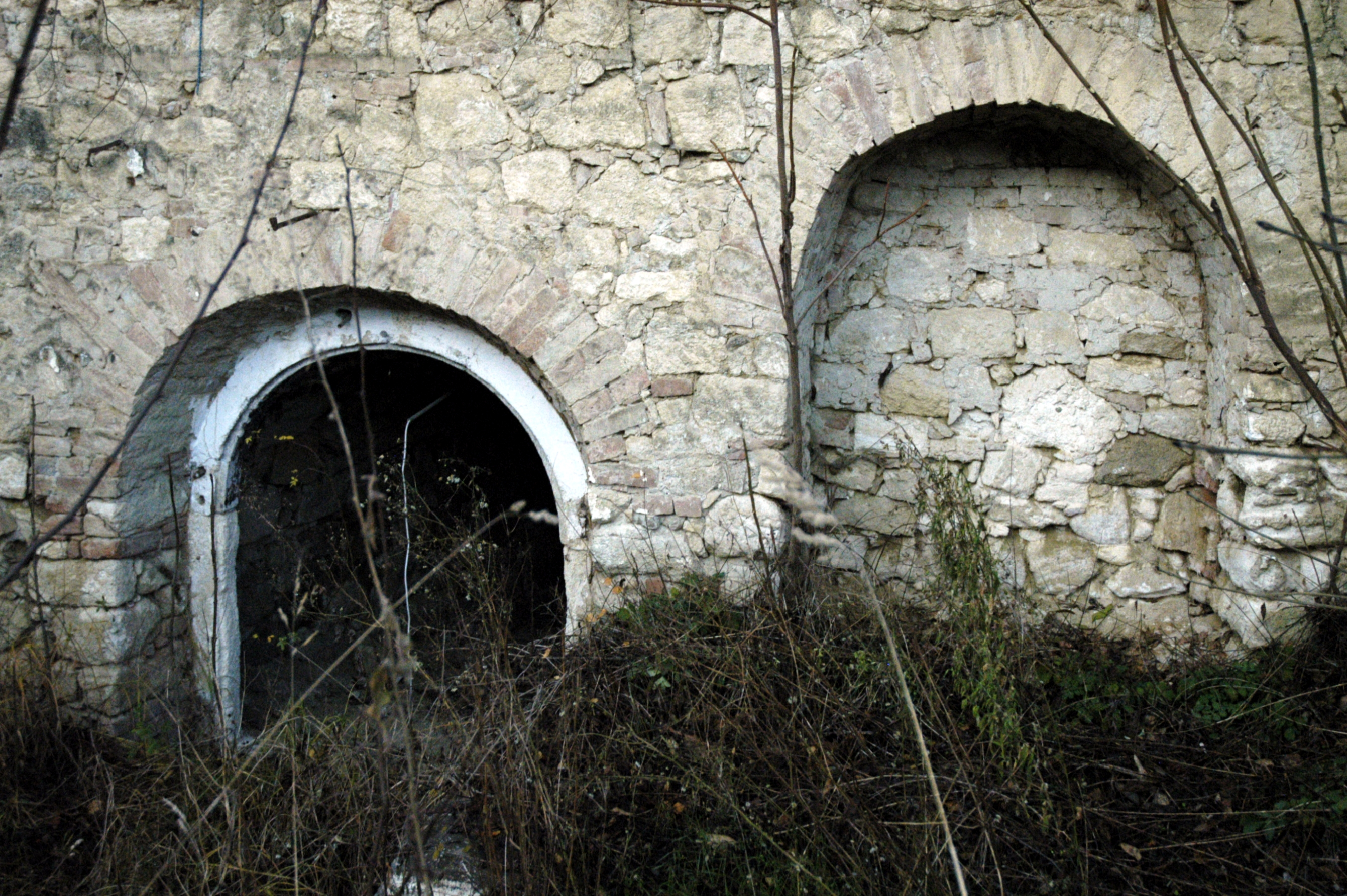 Sitzendorf an der Schmida Mühlbergkellergasse Objekt 20 links